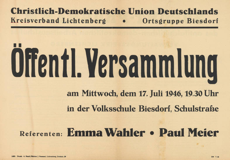 Christlich-Demokratische Union Deutschlands Kreisverband Lichtenberg . Ortsgruppe Biesdorf Öffentl. Versammlung ... Referenten: Emma Wahler . Paul Meier Kommentar: Rückseitig Punkte aus dem "Sofortprogramm des antifaschistischen-demokratischen Arbeitsausschusses Verwaltungsbezirk Lichtenberg" als ursprüngliche Plakatvorderseite. Plakatart: Ankündigungsplakat Auftraggeber: KV Lichtenberg, OG Biesdorf Drucker_Druckart_Druckort: (420) A. Raub (Pächter J. Nesener), Lichtenberg 599 7.46 Objekt-Signatur: 10-004 : 2 Bestand: Plakate zu Abgeordnetenhauswahlen Berlin (10-004) GliederungBestand10-18: Plakate zu Abgeordnetenhauswahlen Berlin (10-004) » CDU Lizenz: KAS/ACDP 10-004 : 2 CC-BY-SA 3.0 DE